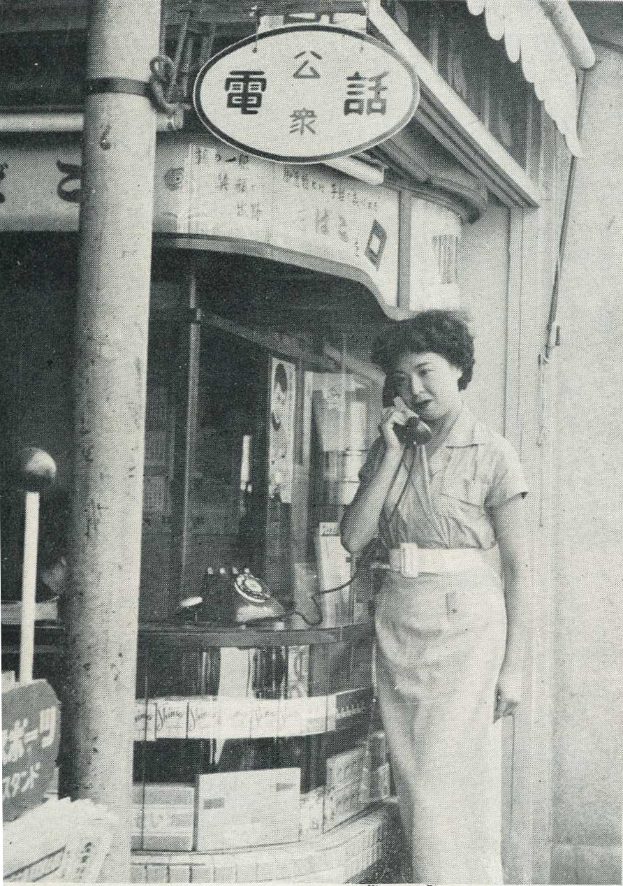 1950年代の公衆電話。戦後、店頭電話としてタバコ屋・薬屋に委託されていた。同時に電報も委託されていた。